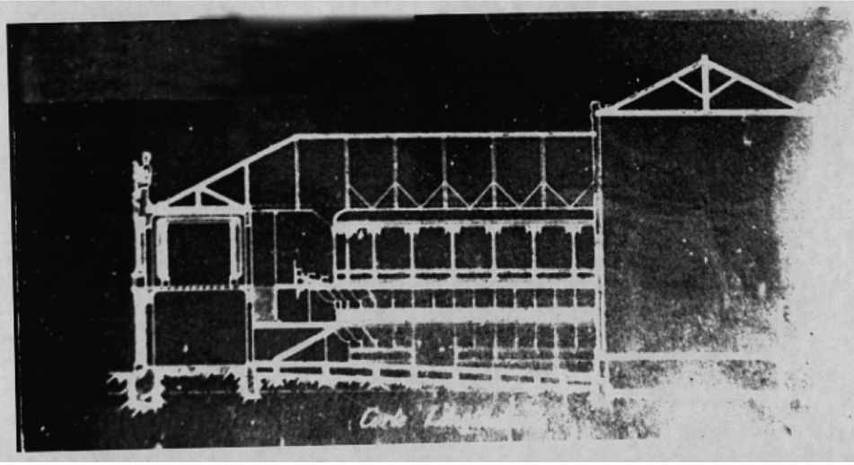 Corte longitudinal do Teatro Municipal de São João da Boa Vista